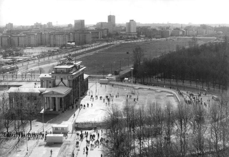 ADN-ZB-Reiche-5.3.1990-Berlin: Brandenburger Tor- Der Blick vom Reichstag zeigt den vier Meter starken Betonpanzer, der das traditionsreiche Bauwerk im Herzen der Stadt noch immer umgibt, in seiner ganzen "Schönheit". Soll das Abtragen wirklich den Mauerspechten überlassen bleiben? Will das Monstrum als Denkmal weiterbestehen? Oder findet sich doch eine Baufirma, die den Platz vor dem Brandenburger Tor aus der Umklammerung befreit?